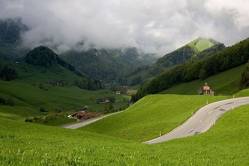 Passwangstrasse mit Oberbeinwil